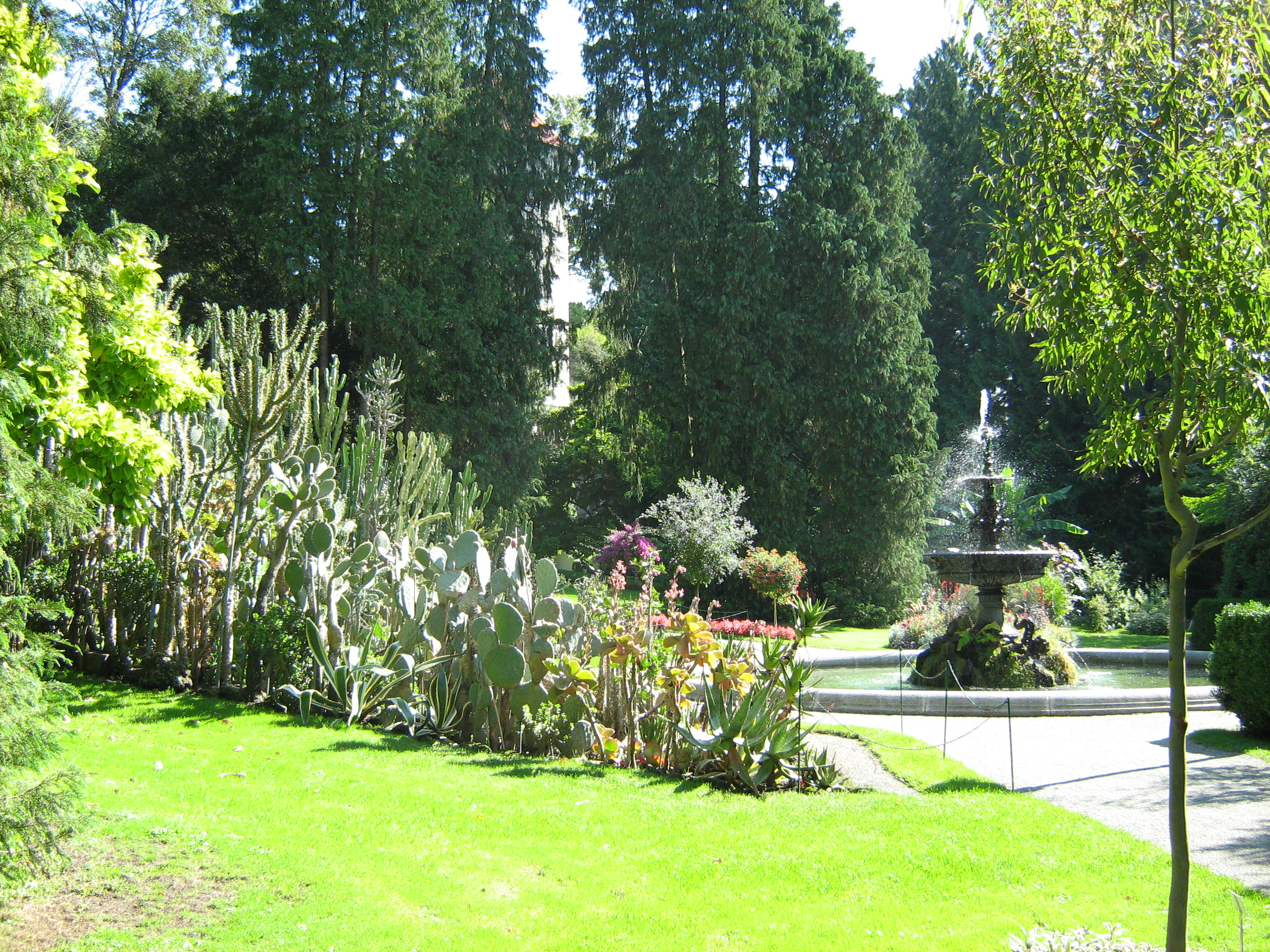 Stadgarten in Überlingen am Bodensee 2007